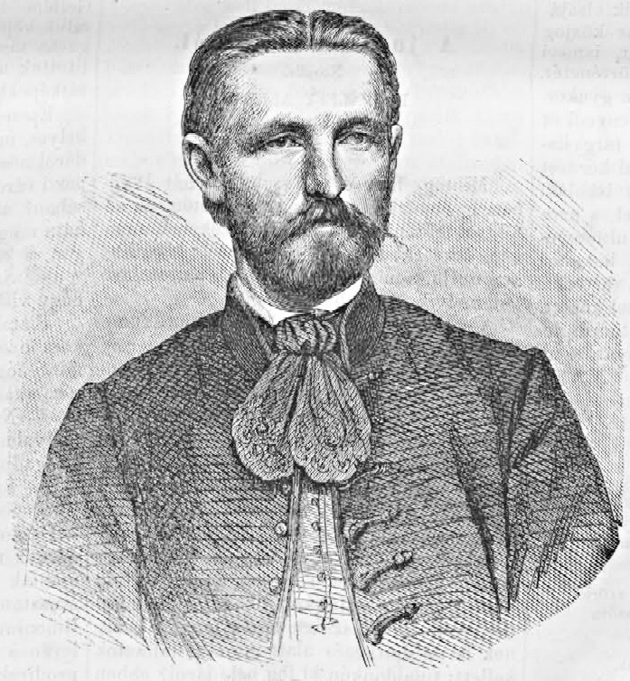 Kautz Gyula (1829–1909) közgazdász, egyetemi tanár, a Magyar Tudományos Akadémia rendes tagja 1865-ben. Fametszet